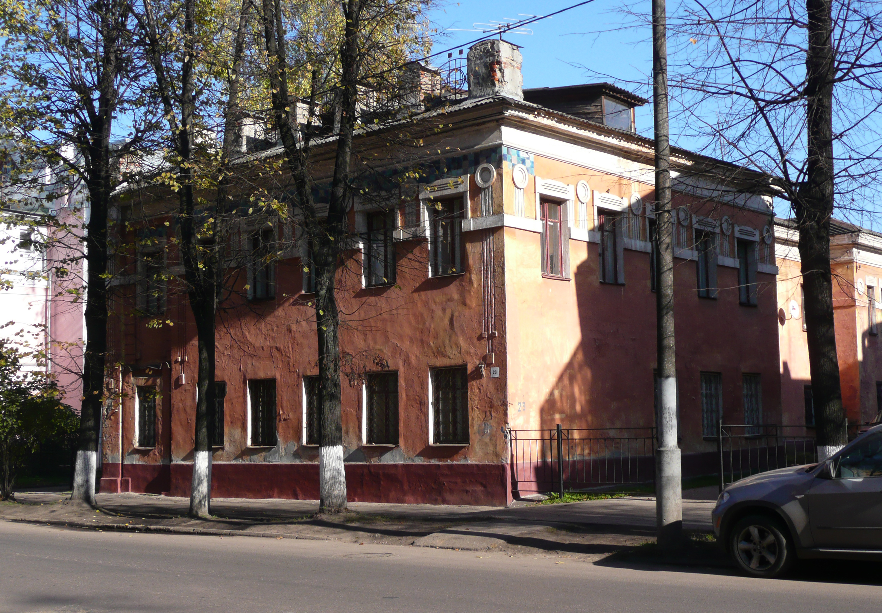 Дом доходный Харчевых: улица Терешковой, 23, Ярославль, Ярославская область